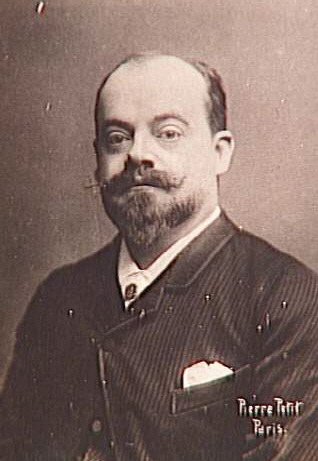 ArtistPhoto réalisée par Pierre Petit (1830-1909)TitleGabriel Ferrier, peintre (1847-1914)Current location Musée d'Orsay Native nameMusée d'OrsayLocationParisCoordinates48° 51′ 36″ N, 2° 19′ 37″ E Established1986Website control VIAF: 130307757 LCCN: n84128587 GND: 006672892 BnF: cb11990767x ULAN: 500310001 WorldCat Source/PhotographerRéunion des musées nationaux This image (or other media file) is in the public domain because its copyright has expired. This applies to Australia, the European Union and those countries with a copyright term of life of the author plus 70 years. You must also include a United States public domain tag to indicate why this work is in the public domain in the United States. Note that a few countries have copyright terms longer than 70 years: Mexico has 100 years, Colombia has 80 years, and Guatemala and Samoa have 75 years, Russia has 74 years for some authors. This image may not be in the public domain in these countries, which moreover do not implement the rule of the shorter term. Côte d'Ivoire has a general copyright term of 99 years and Honduras has 75 years, but they do implement the rule of the shorter term. This file has been identified as being free of known restrictions under copyright law, including all related and neighboring rights.